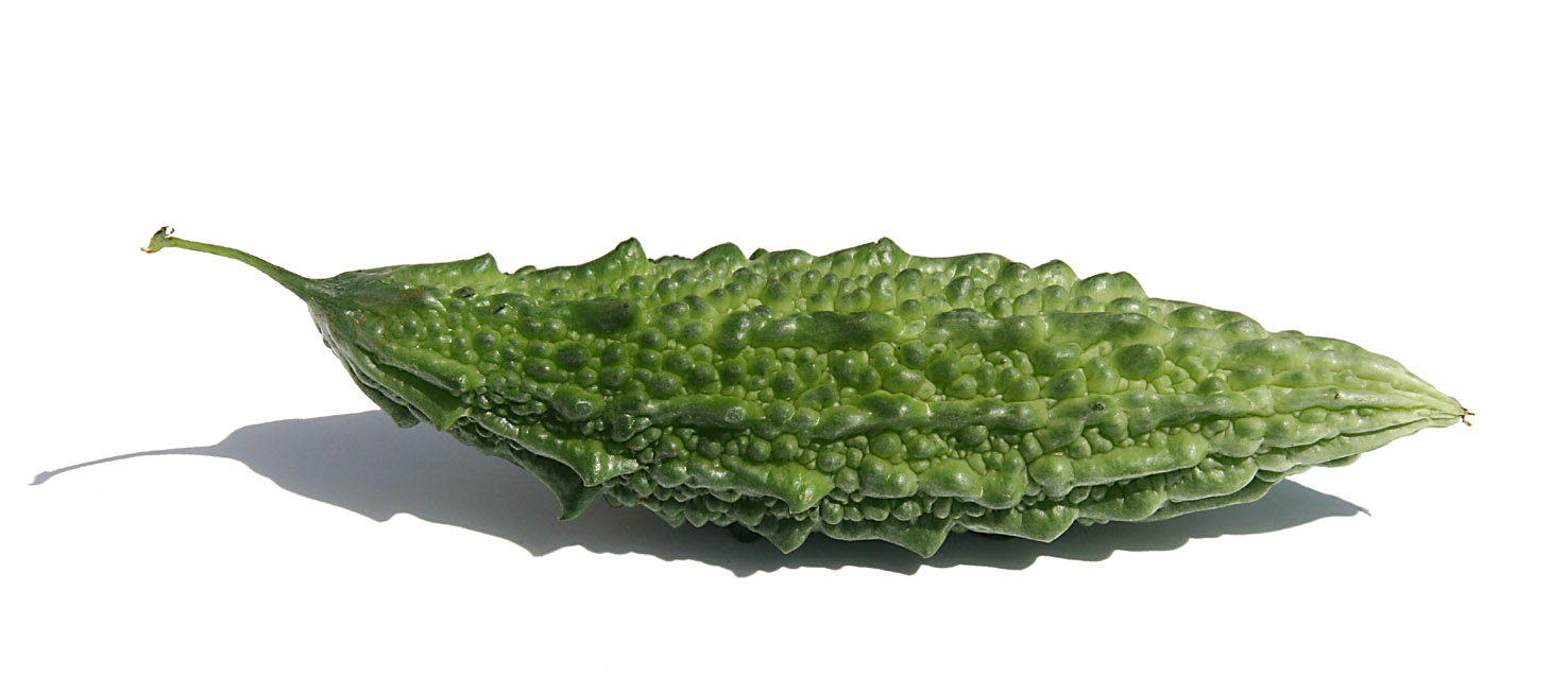 Margose verte